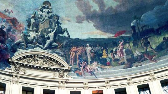 L'histoire du Commerce entre les cinq continents - L'Amérique du Nord. Peint par Evariste-Vital Luminais entre 1886 et 1889. Paris Ier arrondissement, bourse du commerce.